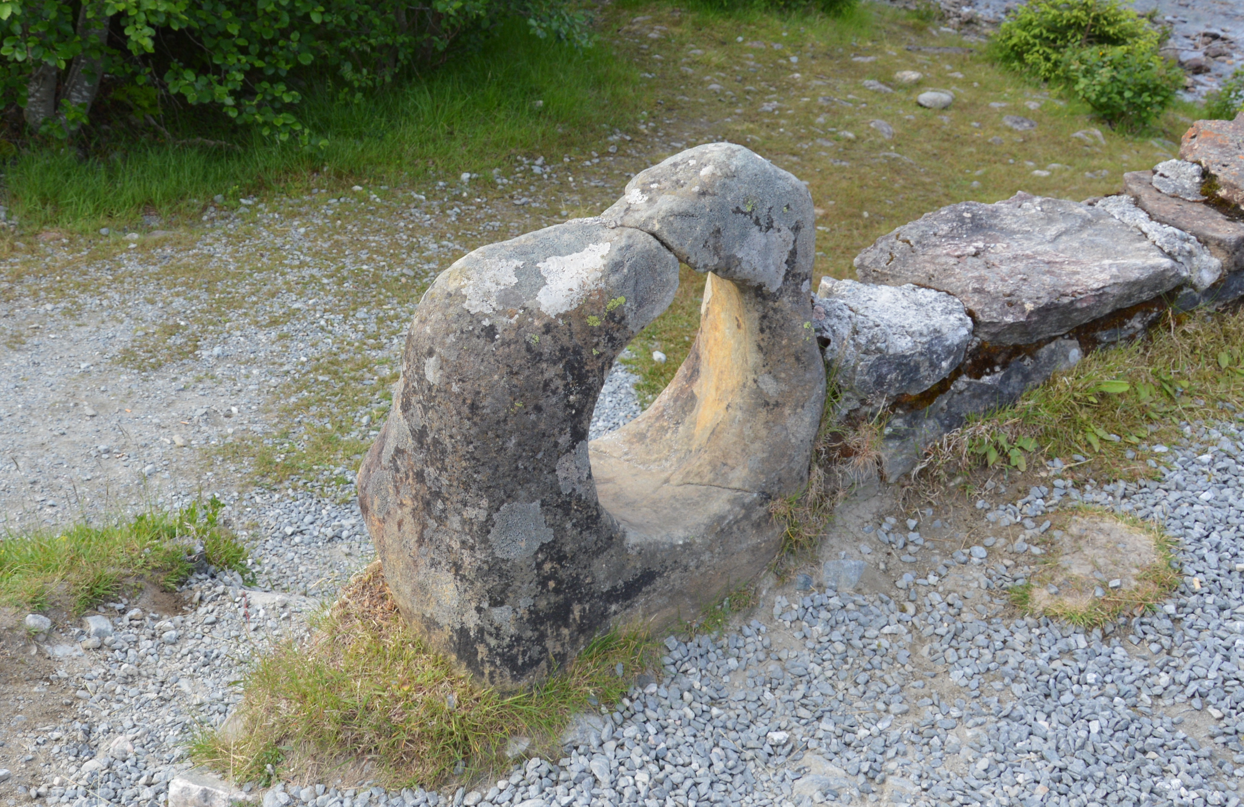 Stein an der Hornindal-Brücke